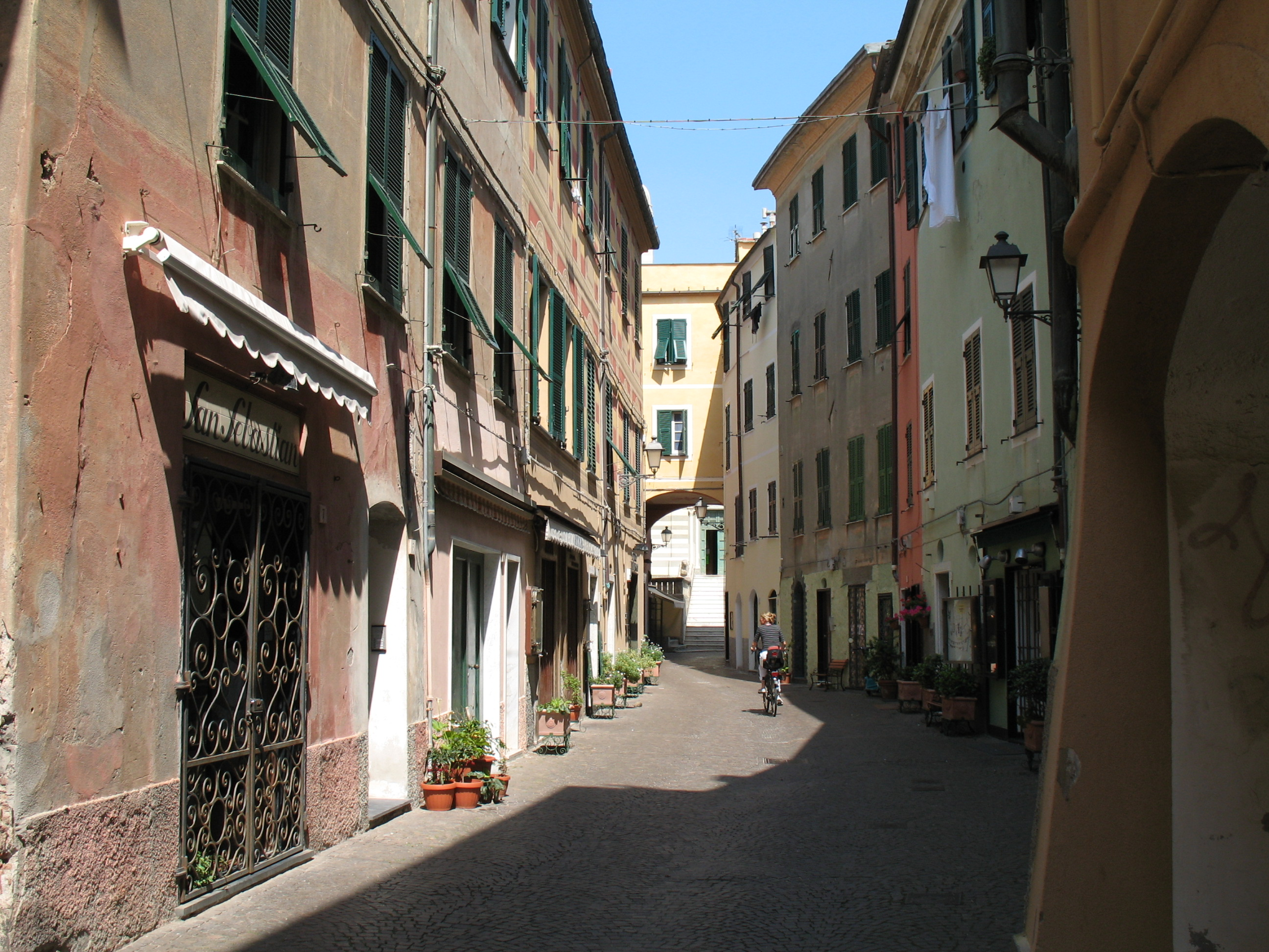 Immagine da Celle Ligure, provincia di Savona